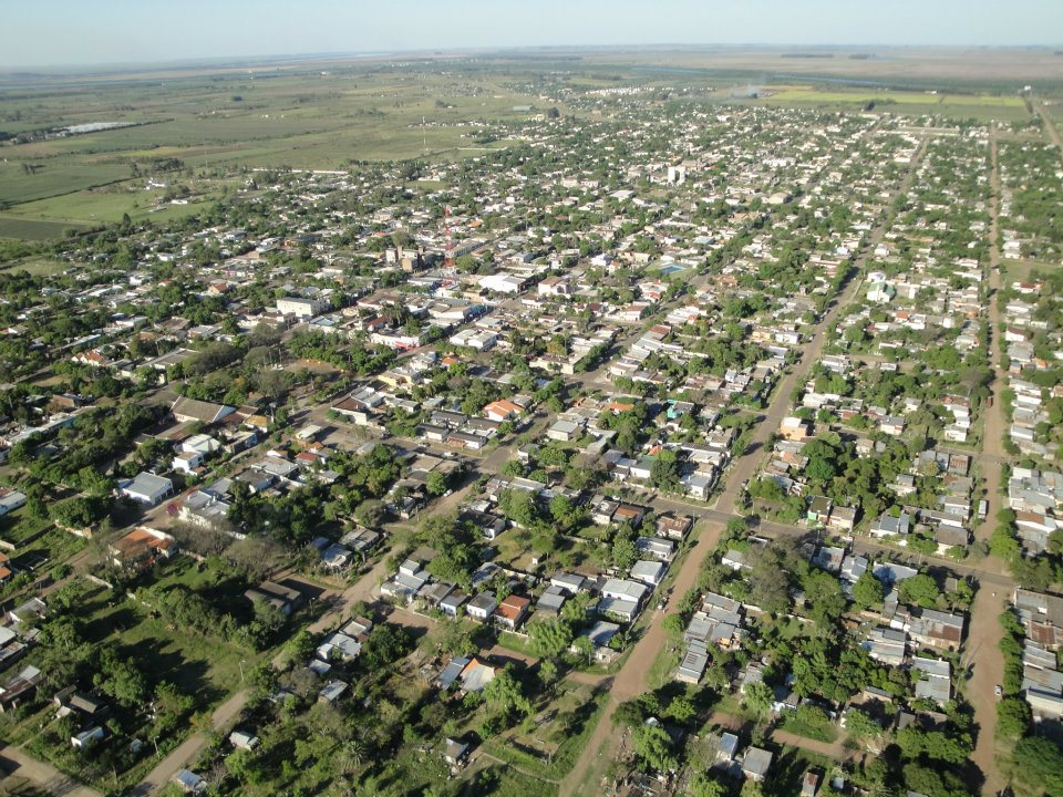 Viste aérea de Bella Unión, ciudad del norte de Uruguay.